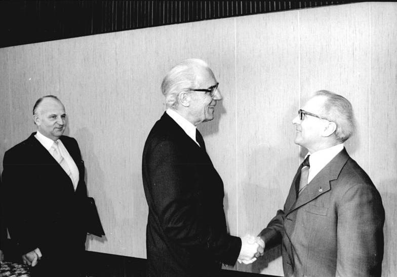 ADN-ZB-Koard-6.3.78-str-Berlin: E. Honecker empfing Kirchenvertreter. Der Generalsekretär des ZK der SED und Vorsitzende des Staatsrates der DDR, Erich Honecker (r), empfing am 6.3. in Berlin den Vorstand der Konferenz der Evangelischen Kirchenleitungen in der DDR. Dabei begrüßte er Bischof D. Dr. Albrecht Schönherr, Vorsitzender der Konferenz (M) und Bischof Dr. Dr. Werner Krusche (l) sowie die weiteren Mitglieder des Vorstands.